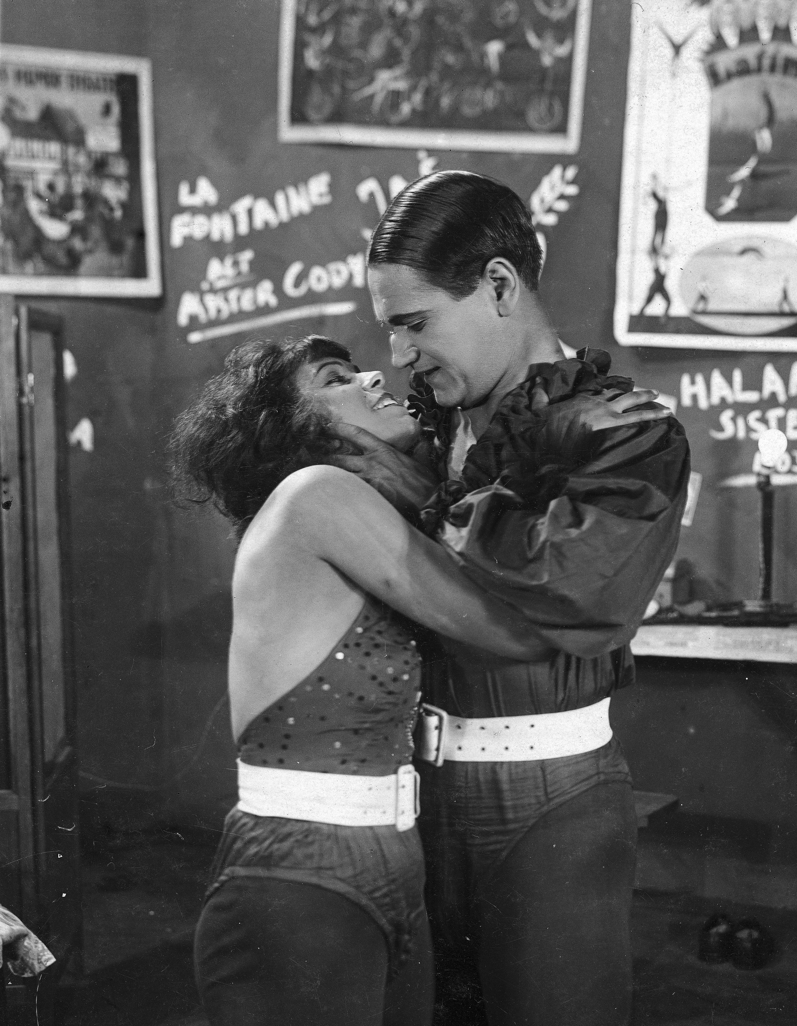 Eugeniusz Bodo jako Inspicjent i Nora Ney jako Maria, jego żona w jednej ze scen filmu "Czerwony Błazen", 1926 r.